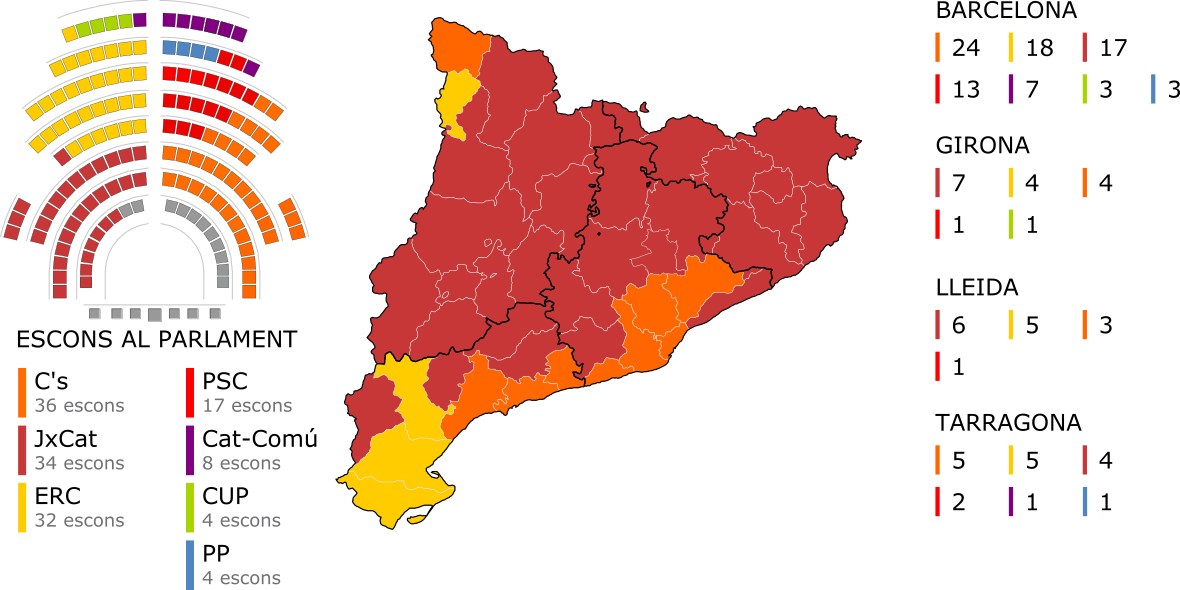 Resultats de les eleccions al Parlament de Catalunya del 21 de desembre de 2017.